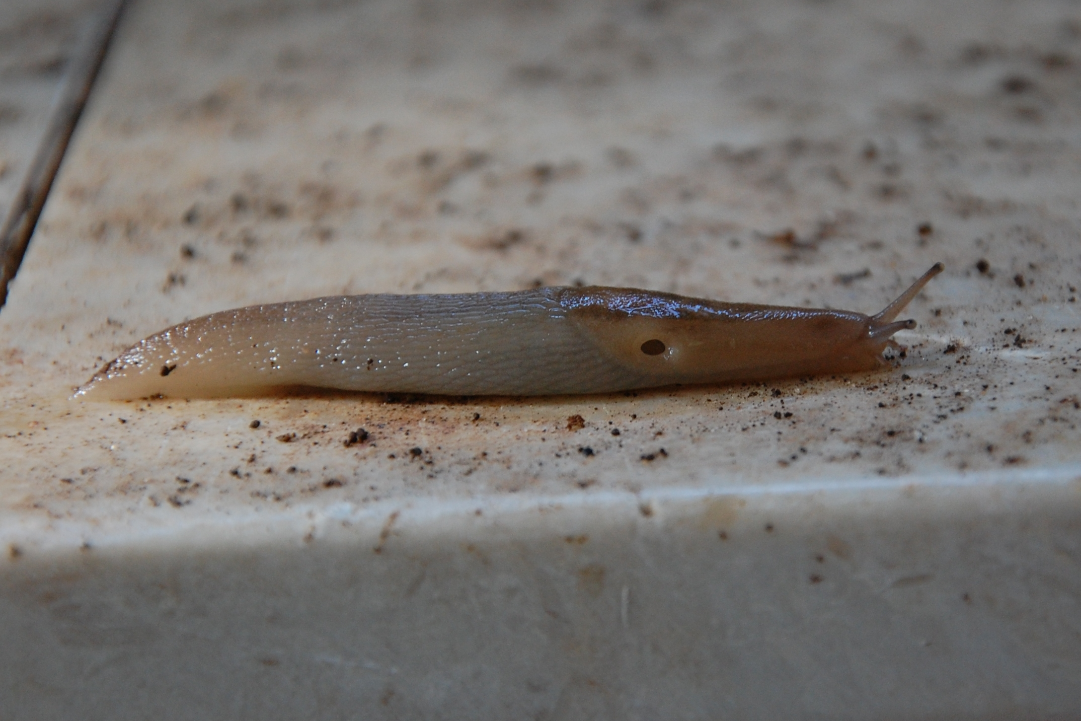 Lehmannia melitensis Sicily